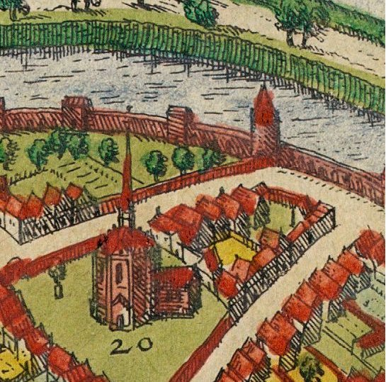 Gertrudenkapelle Hamburg ca. 1590 (Ausschnitt aus Kupferstich)